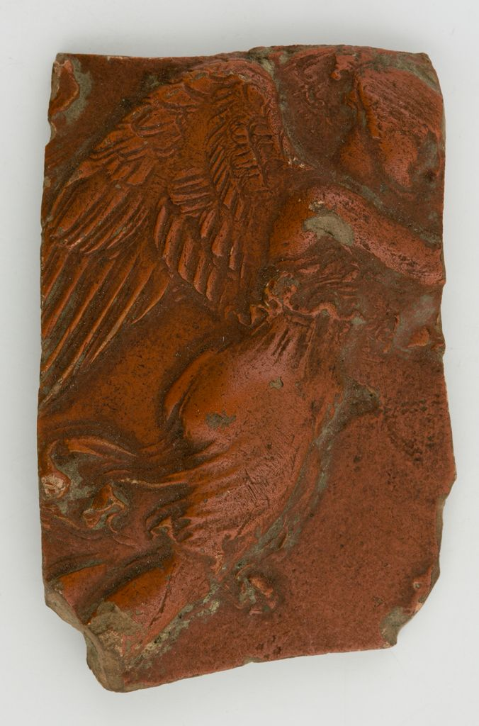 Victoria (Latin pronunciation: [wɪkˈtoːrɪ.a]), in ancient Roman religion, was the personified goddess of victory.[2] She is the Roman equivalent of the Greek goddess Nike, and was associated with Bellona. She was adapted from the Sabine agricultural goddess Vacuna and had a temple on the Palatine Hill. The goddess Vica Pota was also sometimes identified with Victoria. Victoria is often described as a daughter of Pallas and Styx, and as a sister of Zelus, Kratos, and Bia. Arretine Ware Fragment, workshop of M. Perennius, Roman, Augustan Period 31 B.C.–A.D. 14.